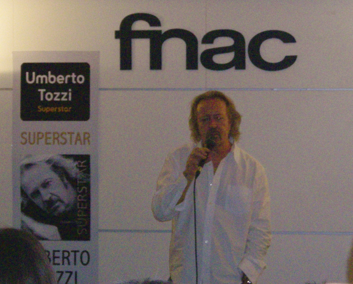 Foto scattata da me